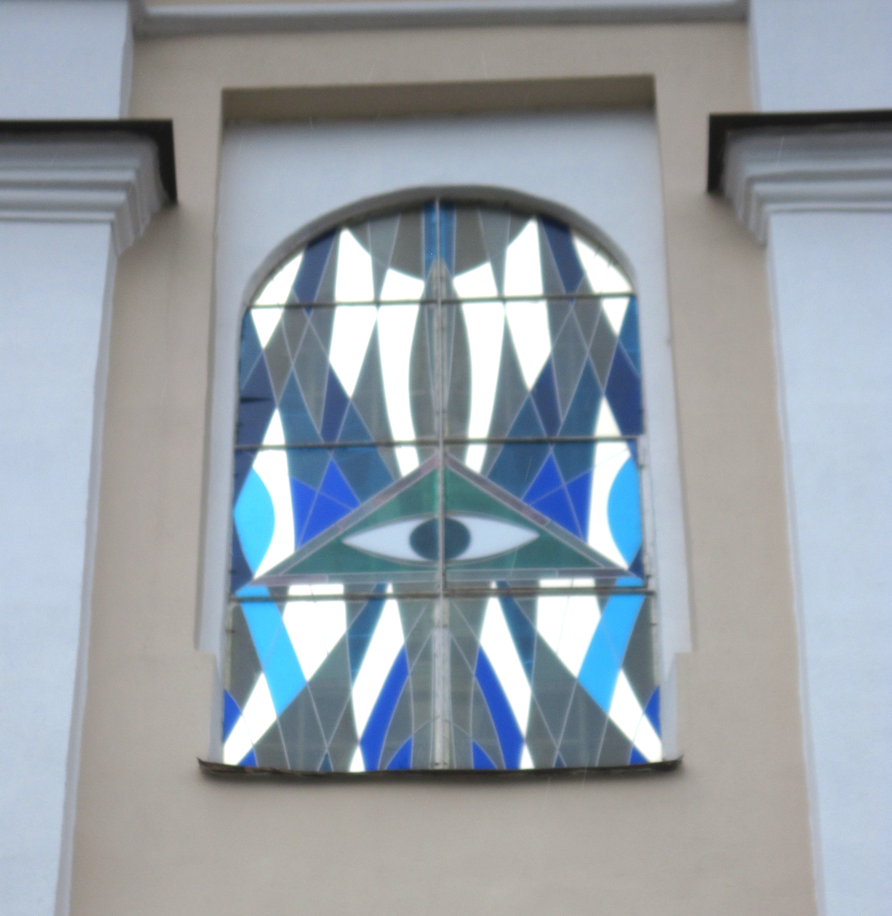 Беларуская (тарашкевіца): Вітраж францысканскага касцёлу, Гродна